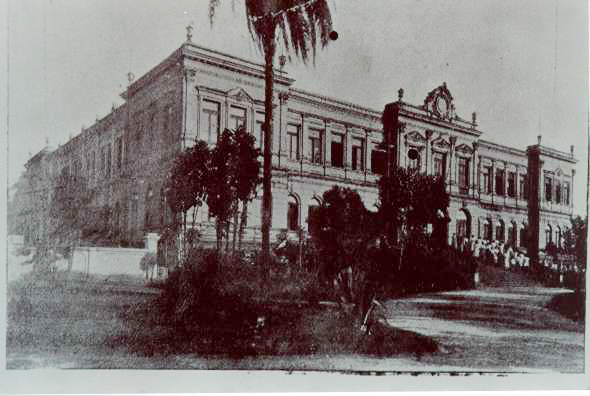 Instituto de Educação de Minas Gerais em 1906.